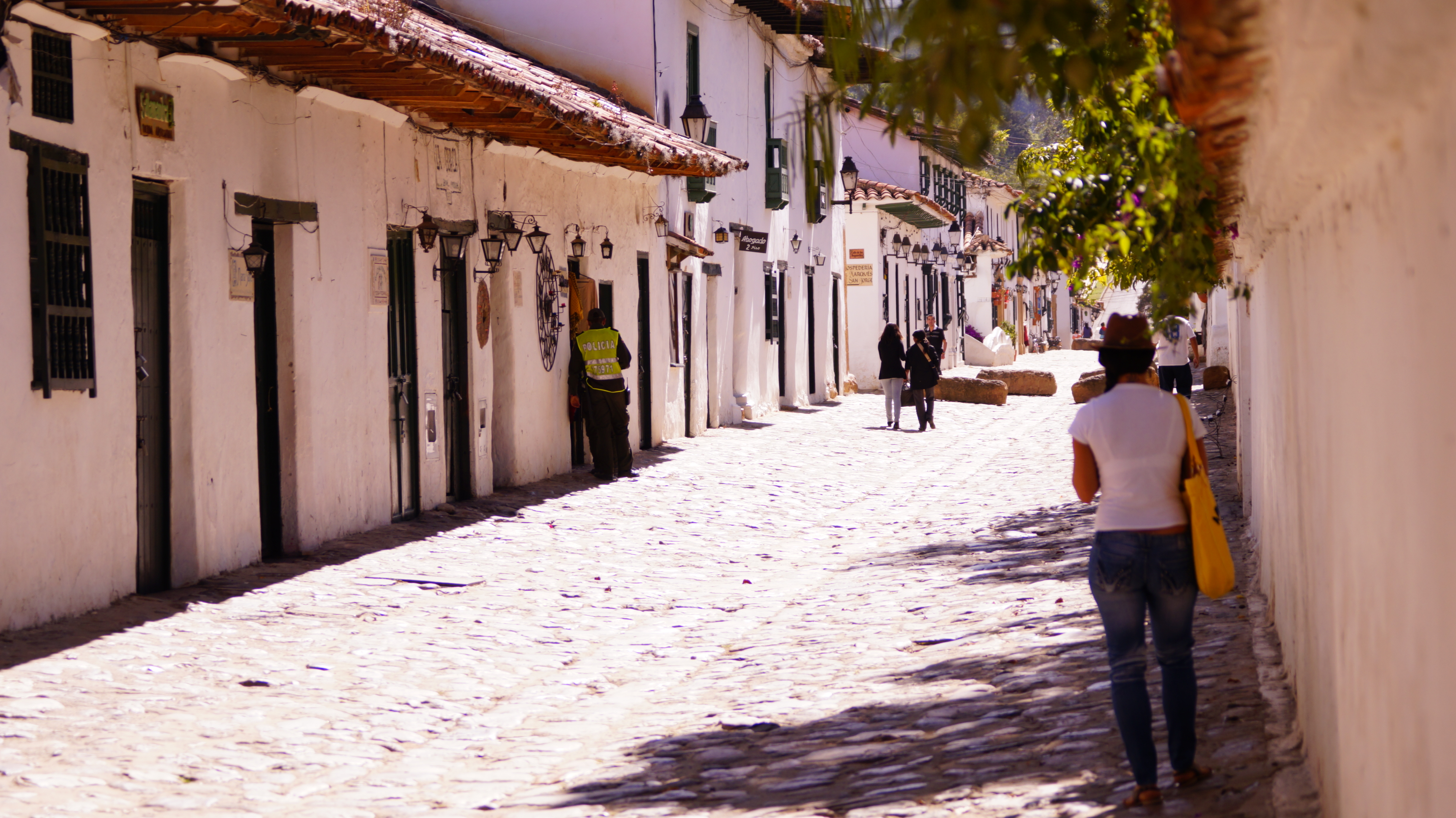 Tiendas y Ventas de articulas de la cultura del pueblo